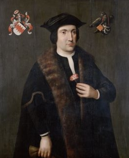 Zogenaamd portret van Jorden Dircksz van Foreest (1482-1509)